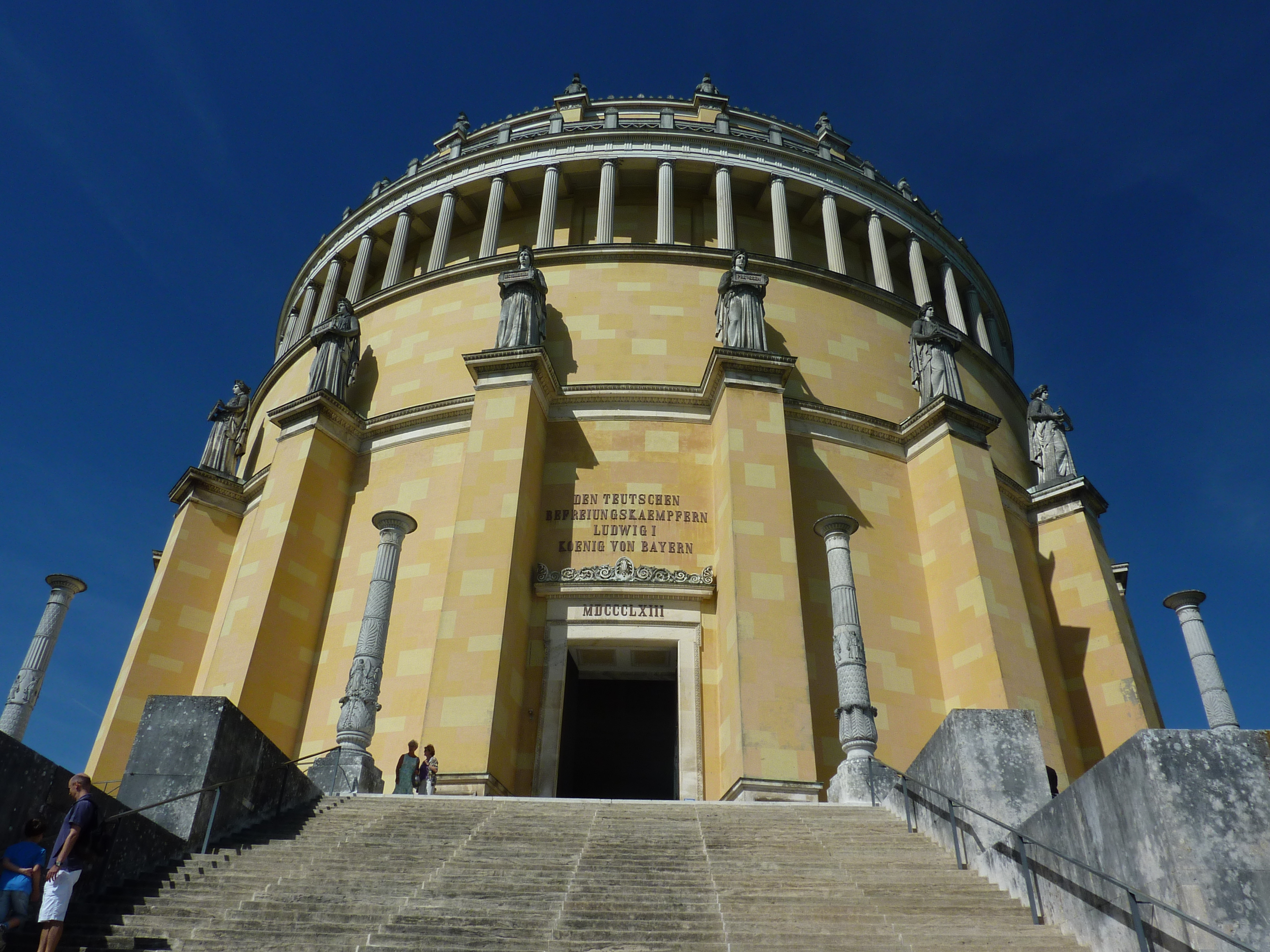 Befreiungshalle, Aufgang